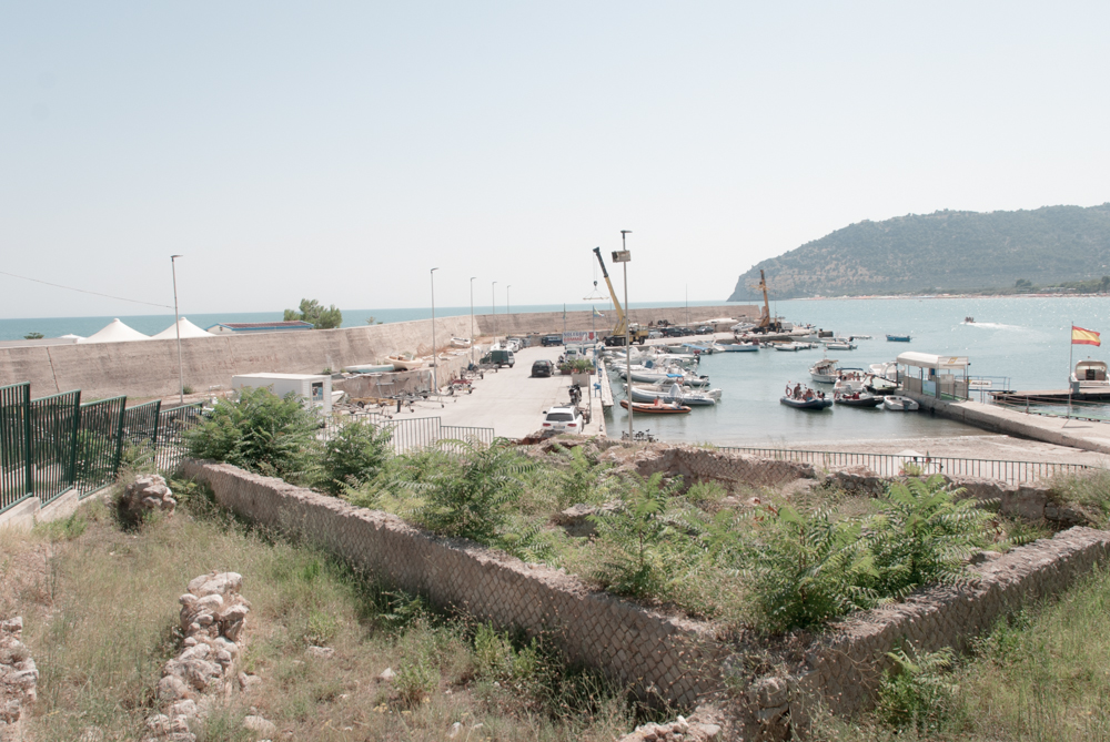 Ville Romane Agnuli Mattinata (FG) area del porto.